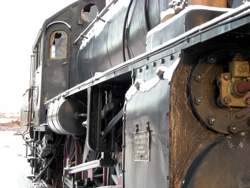 Ånglok vid Morastrand.